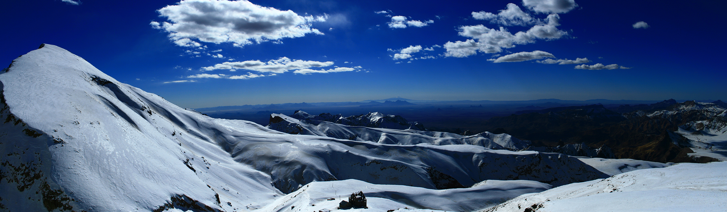 جبهه جنوبی تفتان